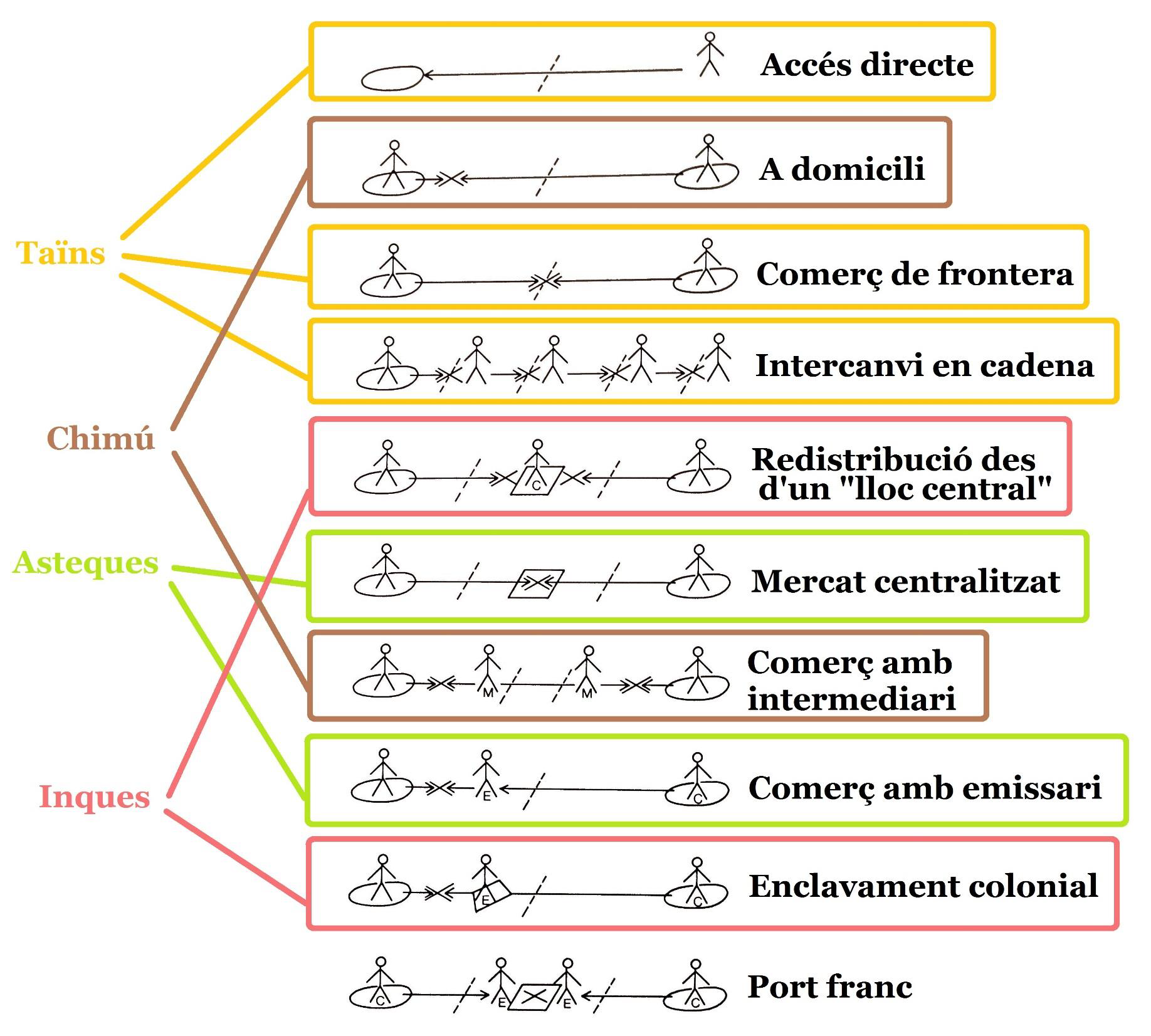 Comerç neolític precolombí